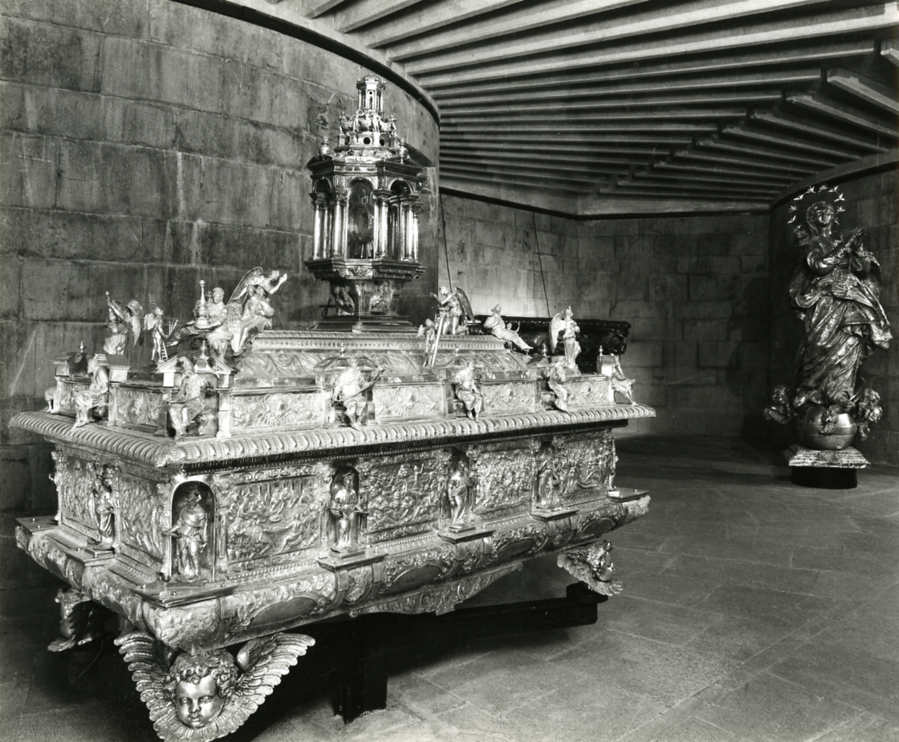 Servizio fotografico : Genova, 1963 / Paolo Monti. - Stampe: 3 : Positivo b/n, gelatina bromuro d'argento/ carta, 24x30. - ((Sul coperchio della scatola, manoscritto a pennarello: "Musei". - Fonte: Agenda di Paolo Monti: Archivio fino 1-4-1961/ 31-3-1963 (1961-1963), presso Archivio Paolo Monti. - Fonte: Agenda di Paolo Monti: R 1 - Monti/ 1 aprile 1963 - 6 giugno 1964/ 6000-8193 (1964-1964), presso Archivio Paolo Monti. - Fonte: Quaderno di Paolo Monti: s.t. [Soggetti e committenti] (1956-1961), presso Archivio Paolo Monti